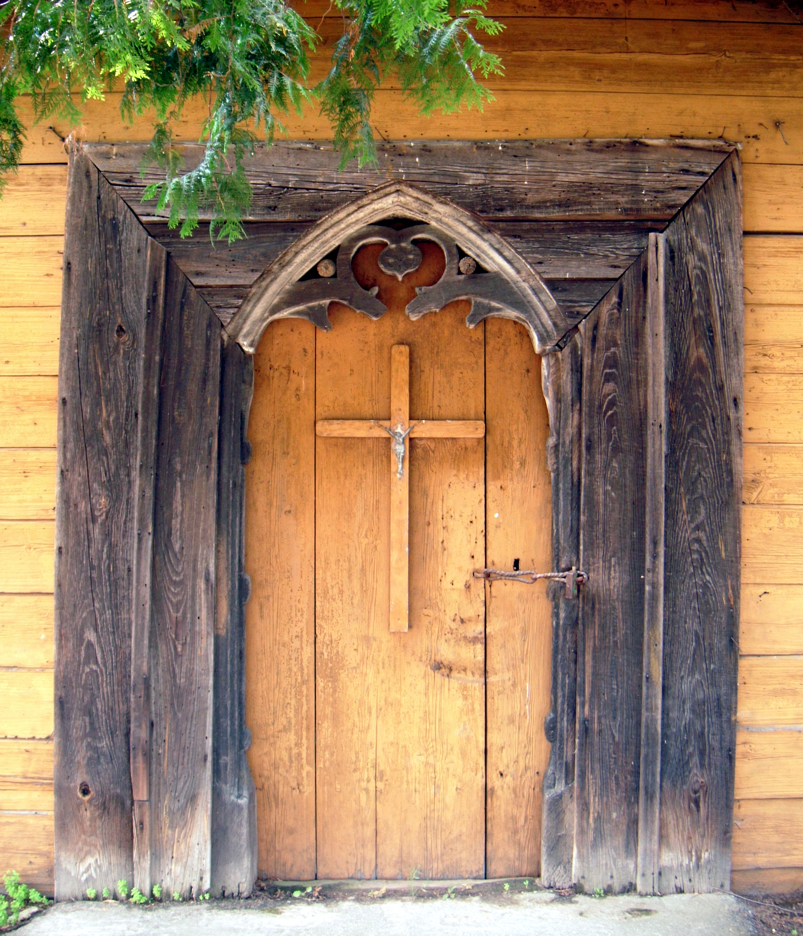 Późnogotycki drewniany portal starego kościoła w Białyninie (1521). Obecnie w kaplicy cmentarza parafialnego.